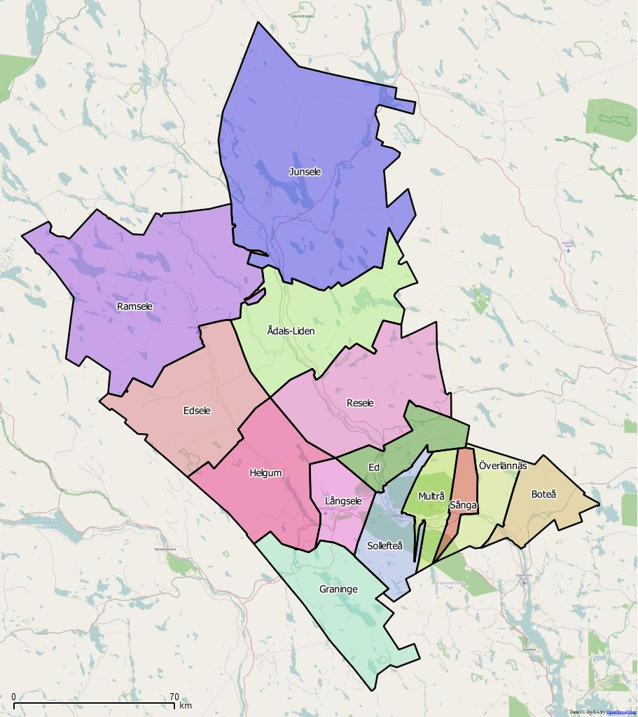 Distriktsindelningen i Sollefteå kommun World file: 305.36743936465938987 0 0 -305.36743936465938987 1748758.33869790844619274 9366049.94785462506115437